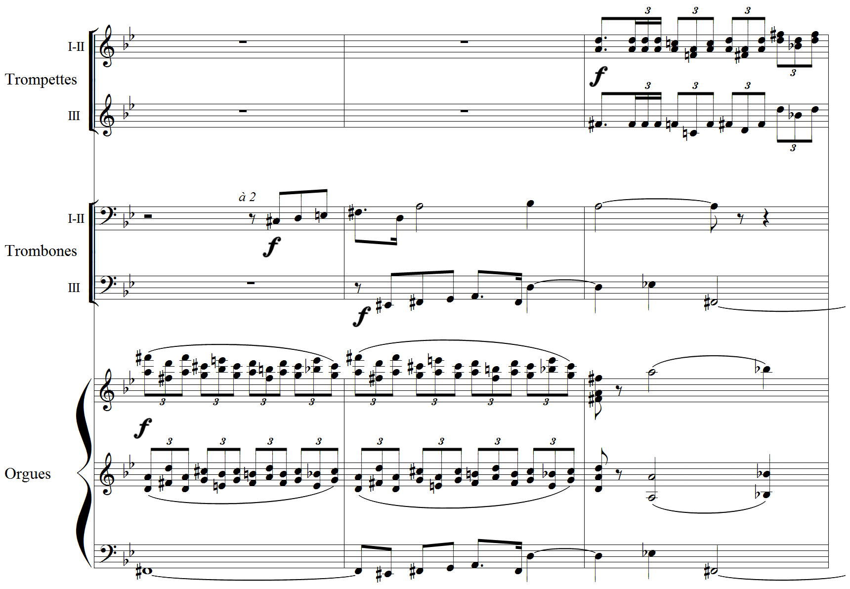 Louis Vierne - Marche triomphale op.46 chiffre 9